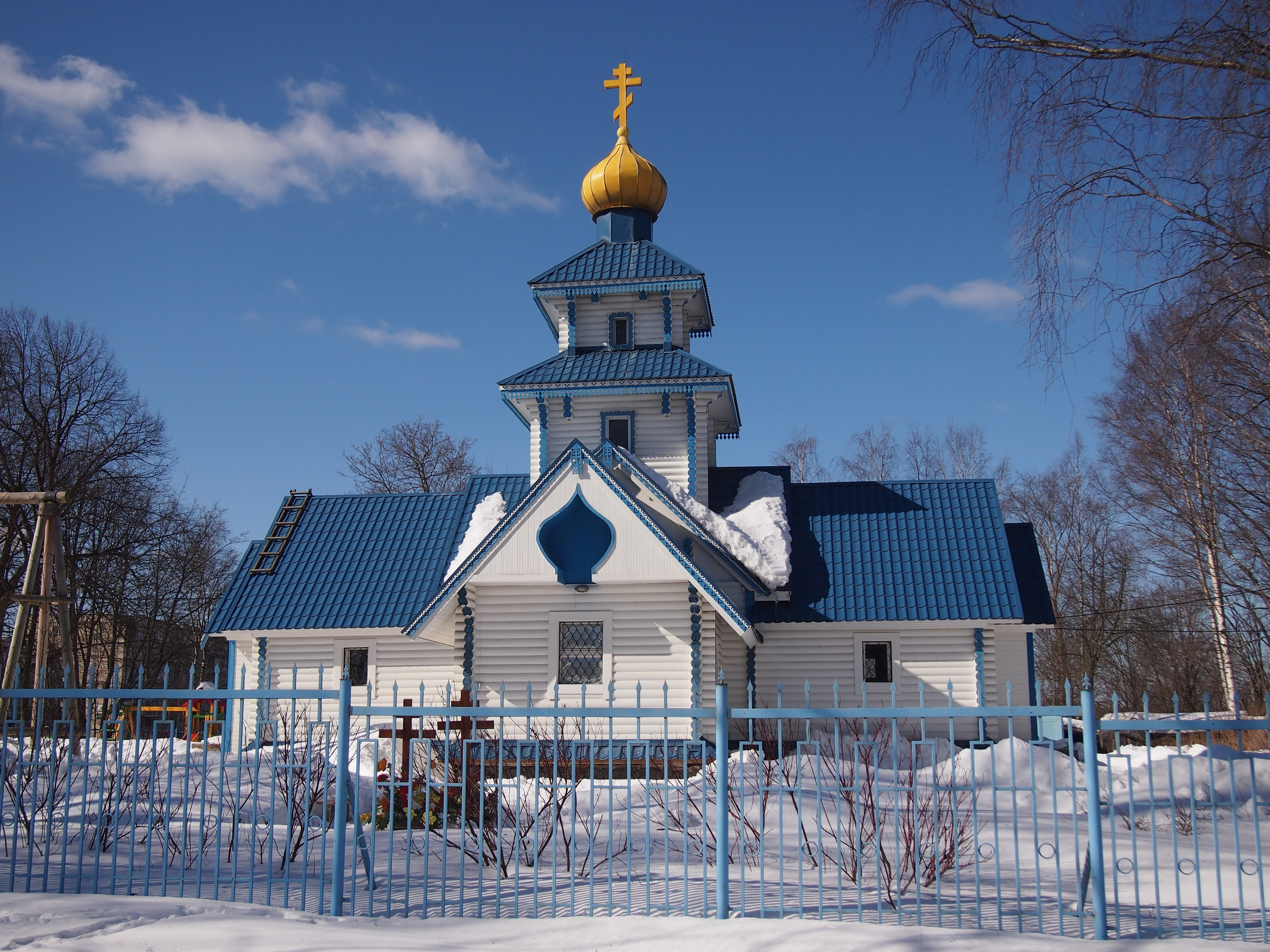 Церковь Николая Чудотворца в Рощино